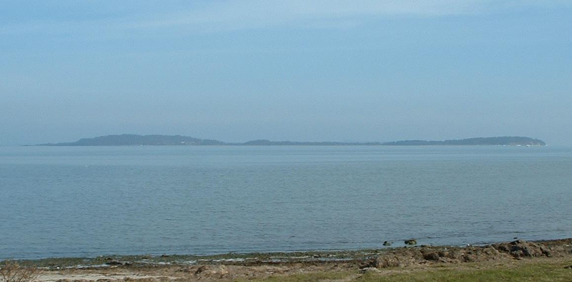 selbstfotografiert am 2003-03-15 GNU FDL Sven Jan Anders, Hamburg 2003